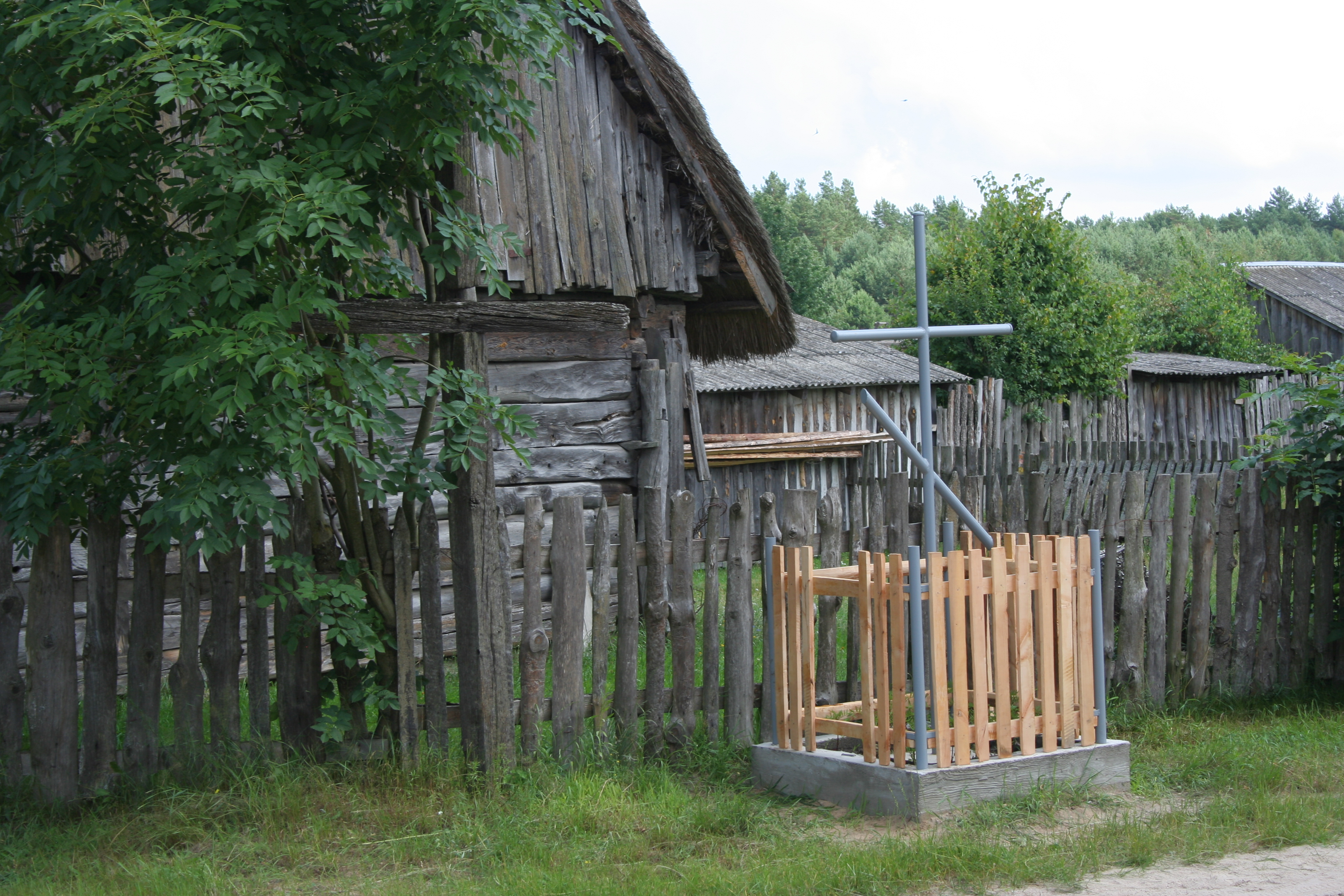 Krzyże przydrożne w Gołubowszczyznie.